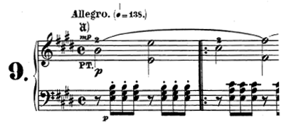 Compassos iniciais do primeiro movimento da Sonata Op. 14 número 1 de Beethoven